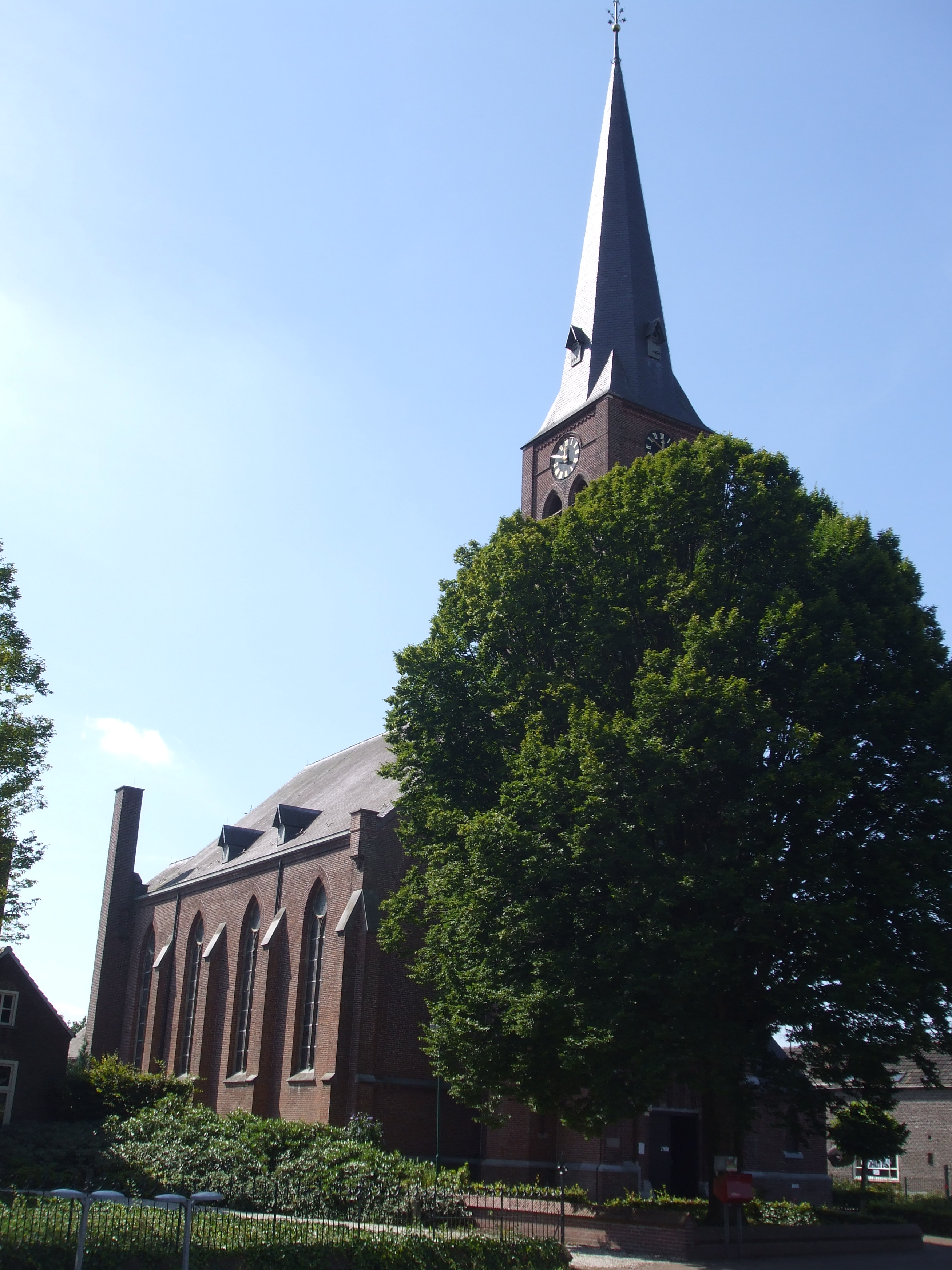 Kirche in Bergeijk-Loo